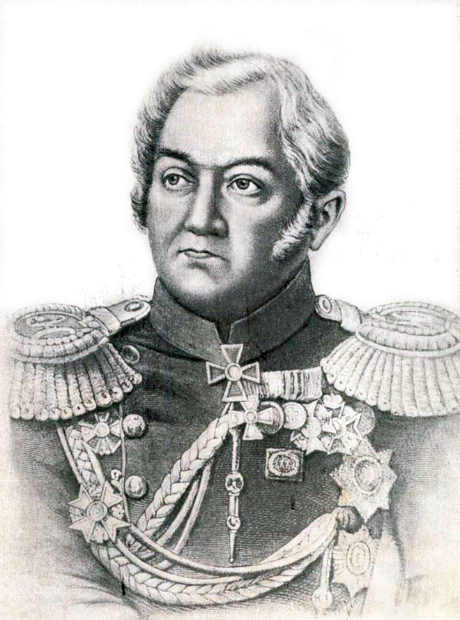 Адмирал Михаил Петрович Лазарев. (с гравюры И. Томсон, относяйщейся примерно к 1835 г.)